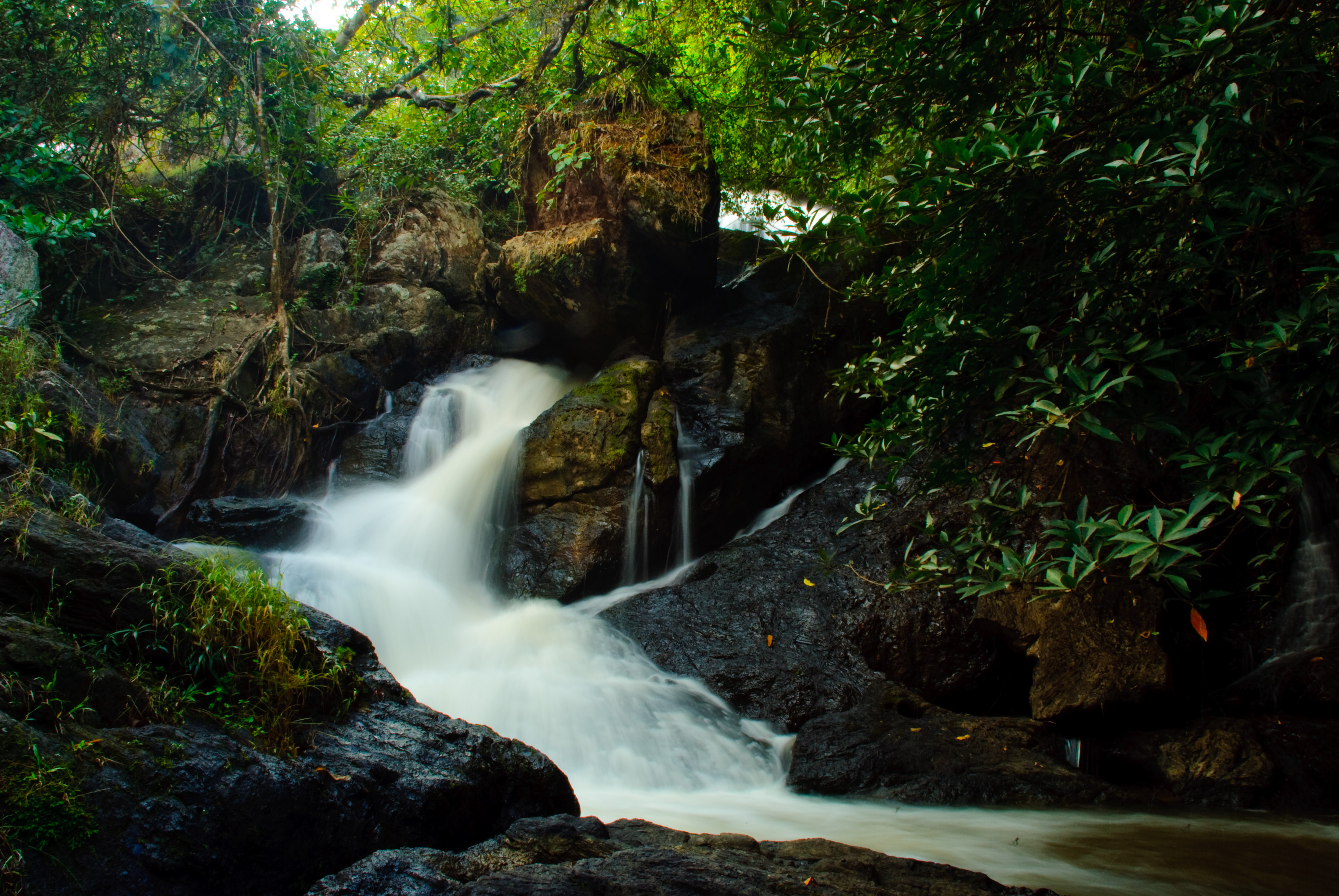 น้ำตกผากล้วยไม้